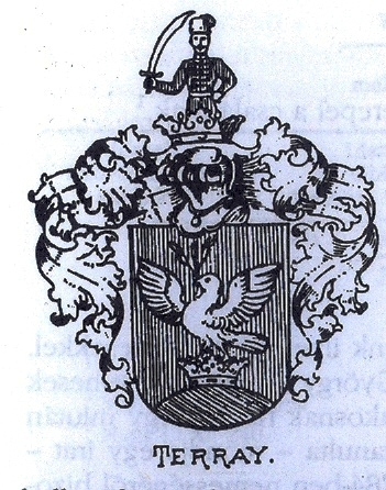 Címer: veres pajzsban, zöld halmon arany korona, melyen ezüst galamb áll, kiterjesztett szárnyakkal, csőrében három búzakalászt tartva. A koronás sisak dísze: növekvő, veres ruhás vitéz jobbjában kardot tart. Sisakdísz: kék-ezüst (másolatban Terray István birtokában Rimaszombaton).